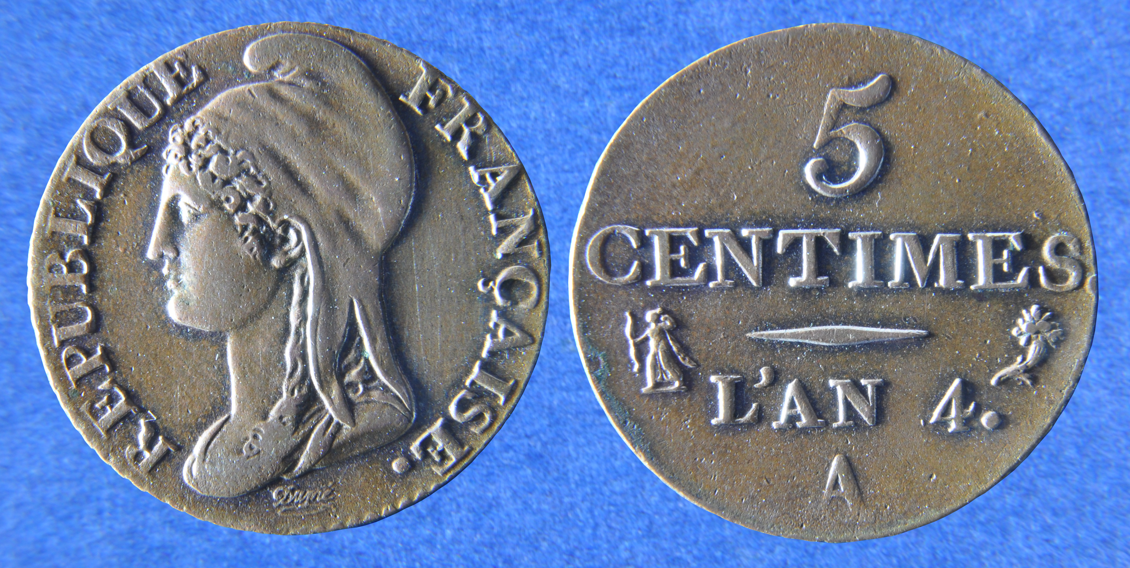 Une monnaie en cuivre de 5 centimes de franc de la Première République française pour l’An 4, atelier de Paris (A). Dans le calendrier républicain, l’an 4 correspond aux années 1795-1796 pour la calendrier grégorien. Il s’agit de la période du Directoire qui va de 1795 à 1799. A/ REPUBLIQUE FRANÇAISE· à l’exergue signature de Dupré en cursif ; Tête de la République ou de la Liberté aux cheveux longs et bouclés vers la gauche coiffé du bonnet phrygien. R/ 5 / CENTIMES / trait séparatif et au-dessous L’AN 4 / A ; différents de part et d’autre de la date. Dimension : 23 mm Poids : 5 g Fabrication : 11.589.079 Type : F.113/1 État de la monnaie : SUP 53 Remarques : En 1795, c’est le passage au franc. La loi du 28 thermidor an 3 (15 août 1795) prévoit la fabrication de monnaies en cuivre avec la représentation de la Liberté. Différents : L’Artémis tirant à l’arc (à gauche) est le différent d’Augustin Dupré, graveur général de l’An IV (septembre 1795) à germinal An XI (mars-avril 1803). La corne d’abondance (à droite) est le différent de Louis-Alexandre Röettiers de Montaleau, directeur de l’atelier de Paris du 2 vendémiaire An 4 (24 septembre 1795) au 15 fructidor An 5 (1er septembre 1797). Bibliographie : Le Franc XI, Les Monnaies, 2012 ; Édition les Chevau-légers